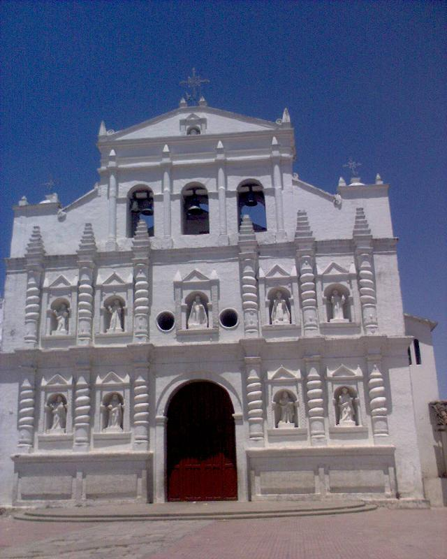 Iglesia católica de Santa María Chiquimula, Totonicapán, Guatemala.